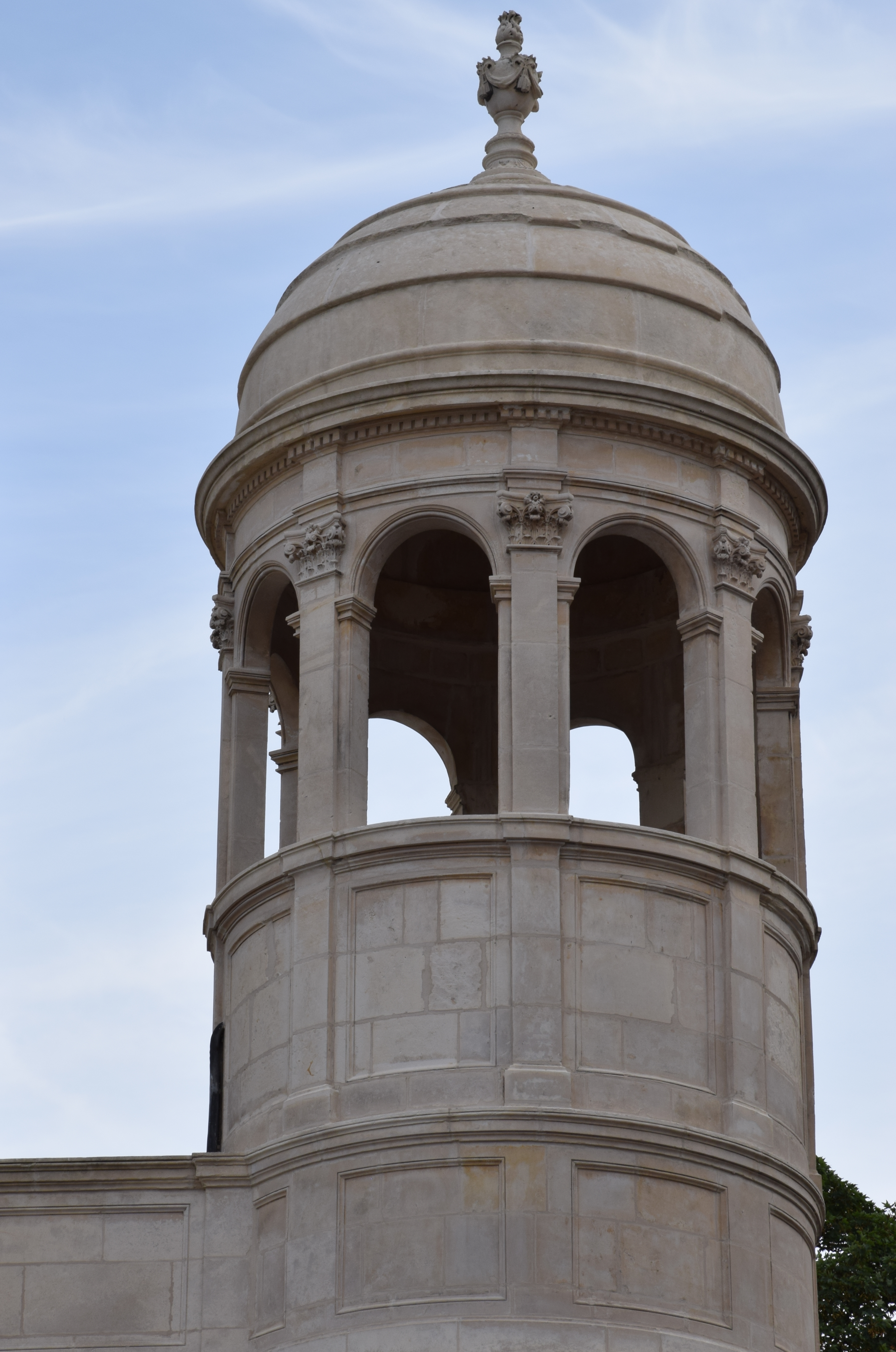 Hôtel Jean Beaucé (après rénovation), façade rue Lebascle. .